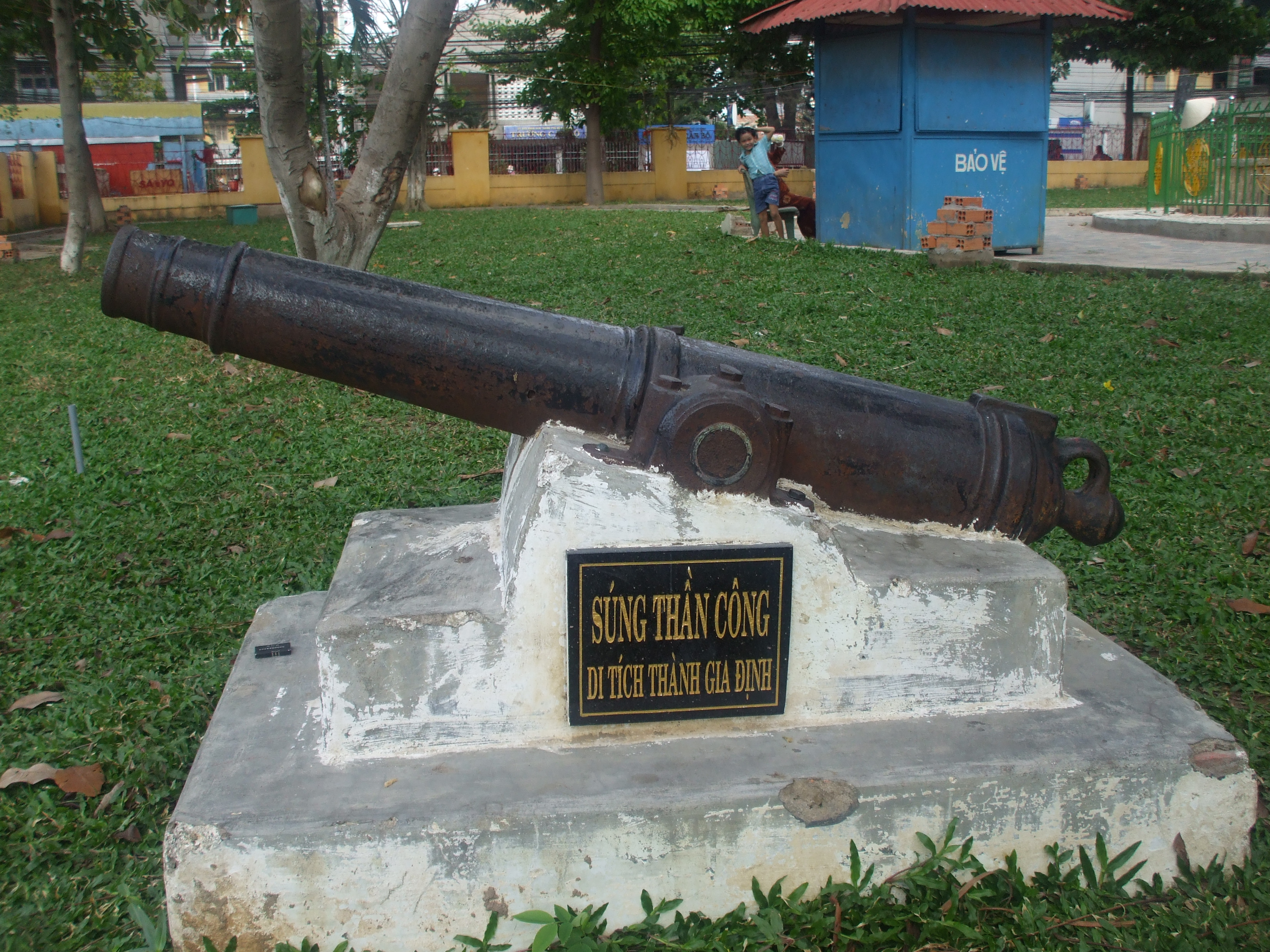 Một khẩu đại bác của quân đội Việt ở thành Gia Định xưa, hiện đang được được trưng bày trong khuôn viên Lăng Ông Bà Chiểu tại TP. Hồ Chí Minh, Việt Nam.